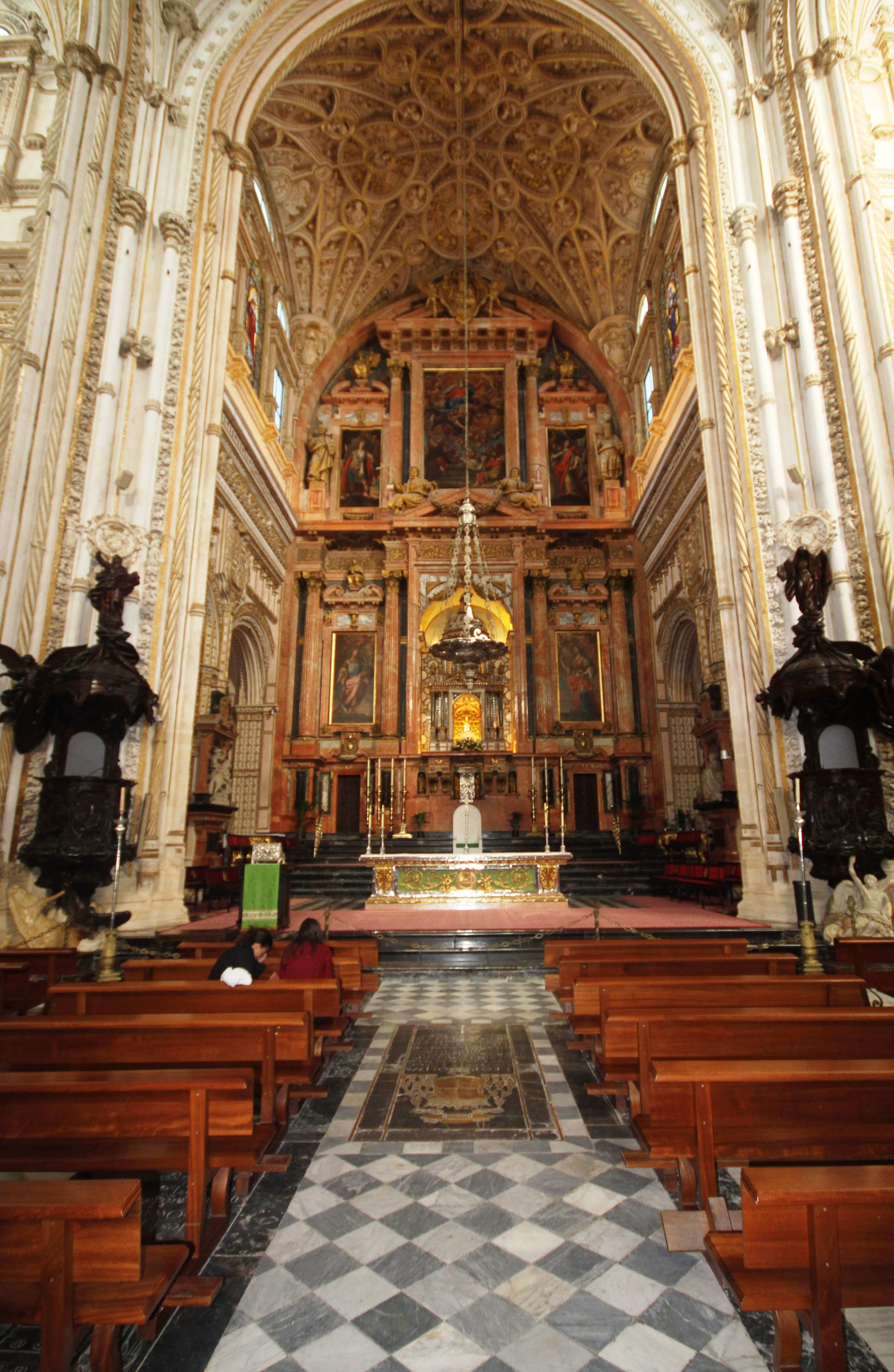 Altar-mor da Catedral de Córdoba